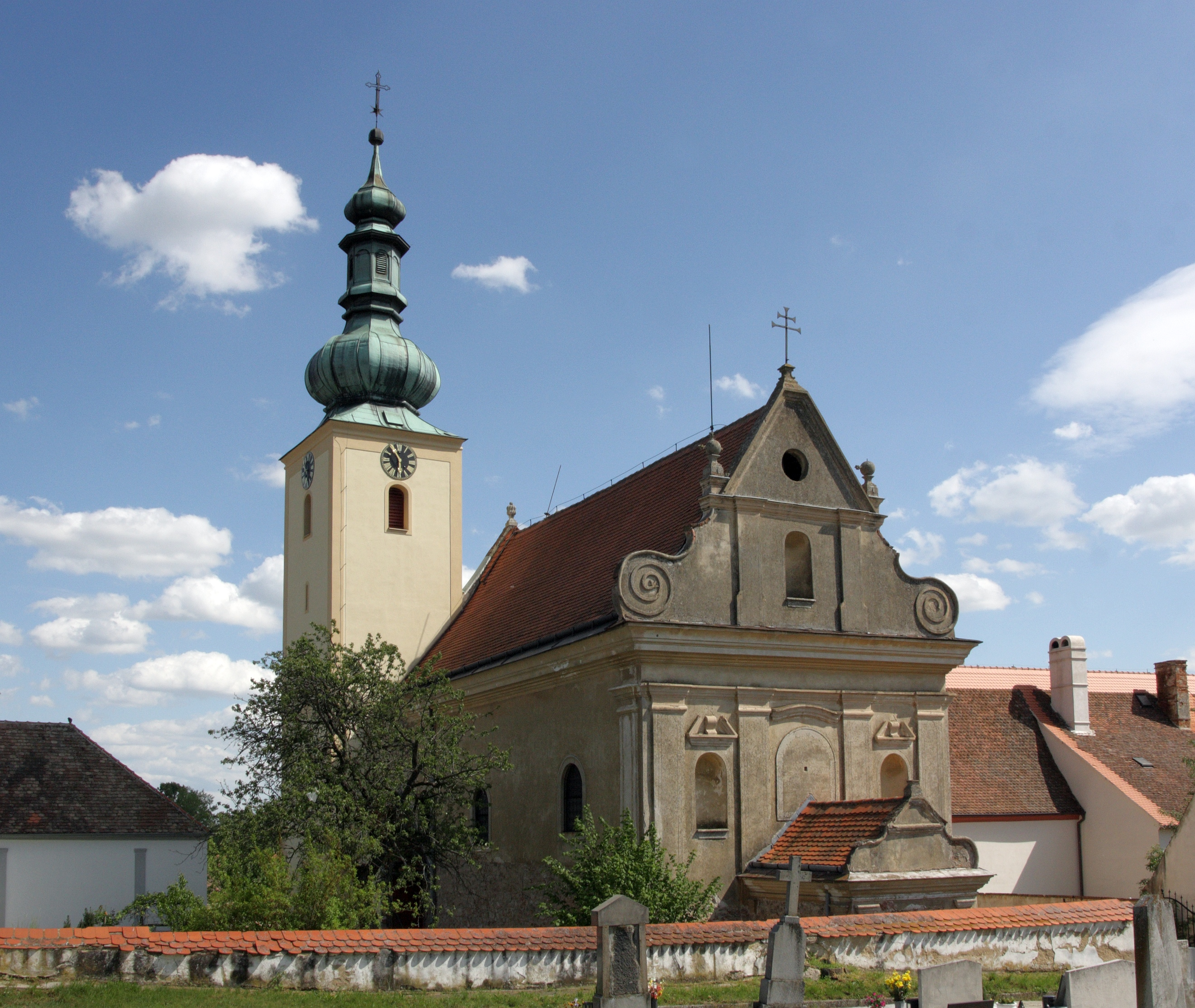 Popice (Znojmo) - kostel sv. Zikmunda.